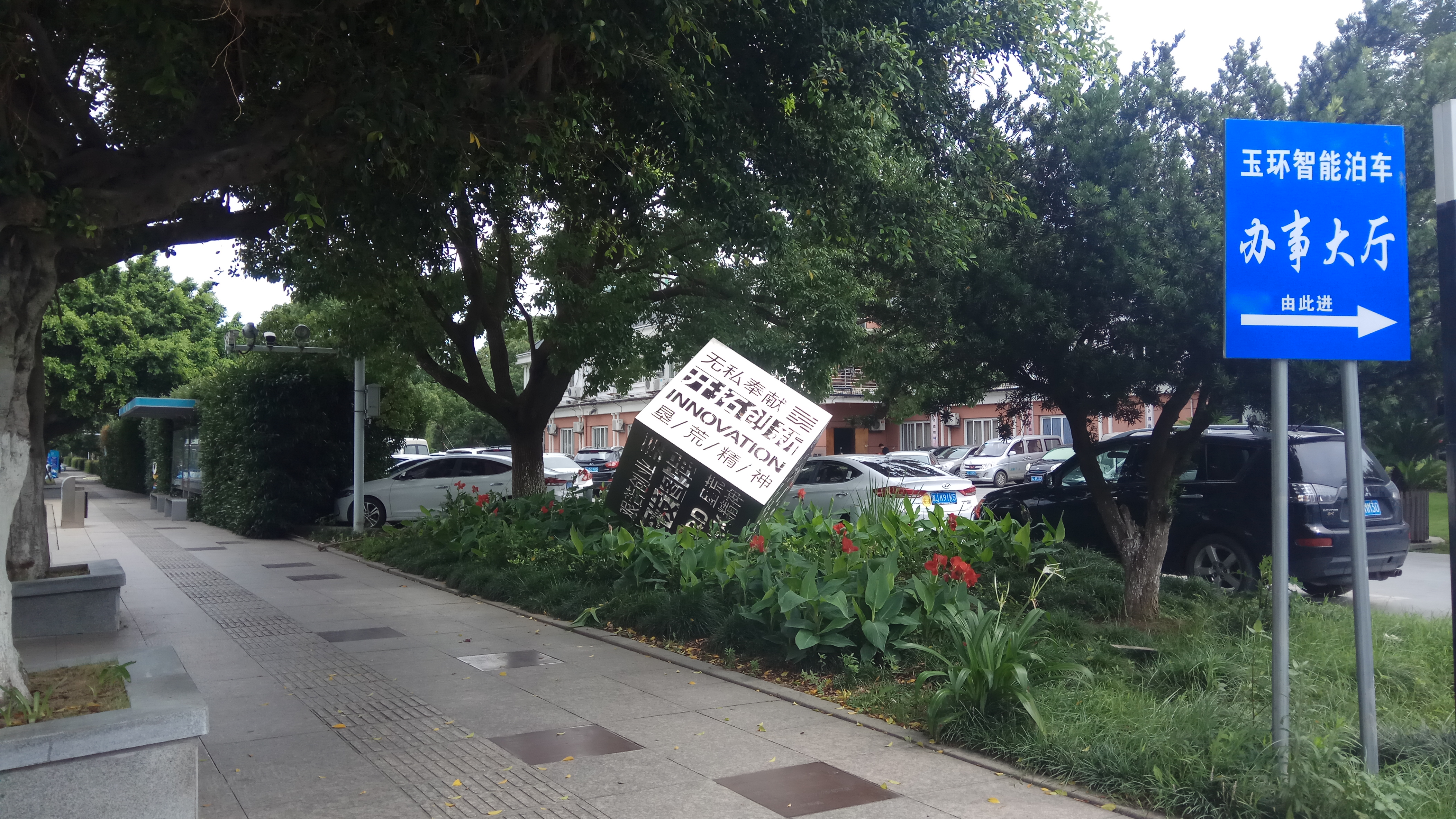 中文（中国大陆）: 玉环的一处金属雕塑